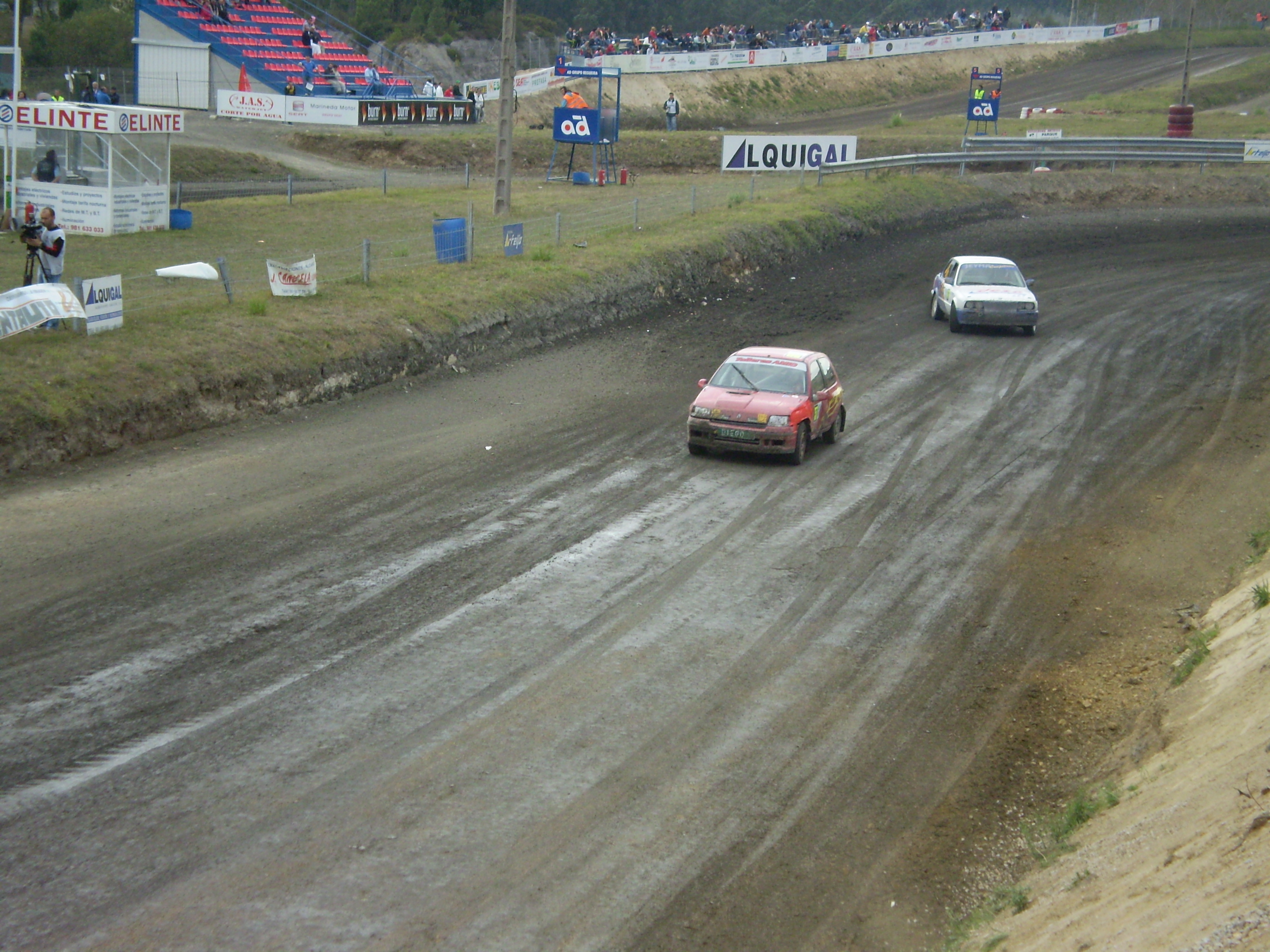 Circuito de Autocross de Arteixo en 2007.